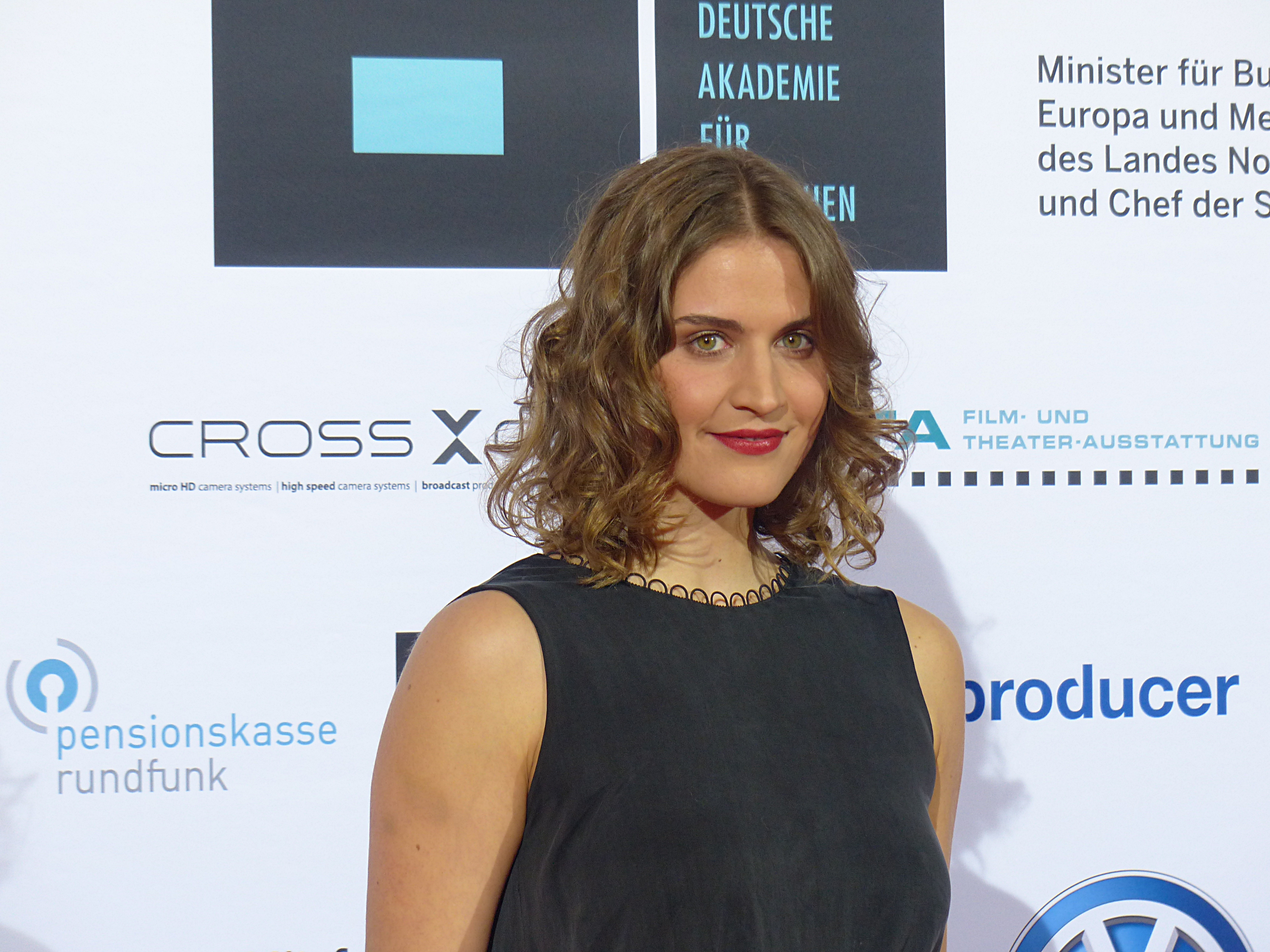 Morgane Ferru bei der Verleihung zur Auszeichnung 2015, durch die Deutsche Akademie für Fernsehen, im November 2015.